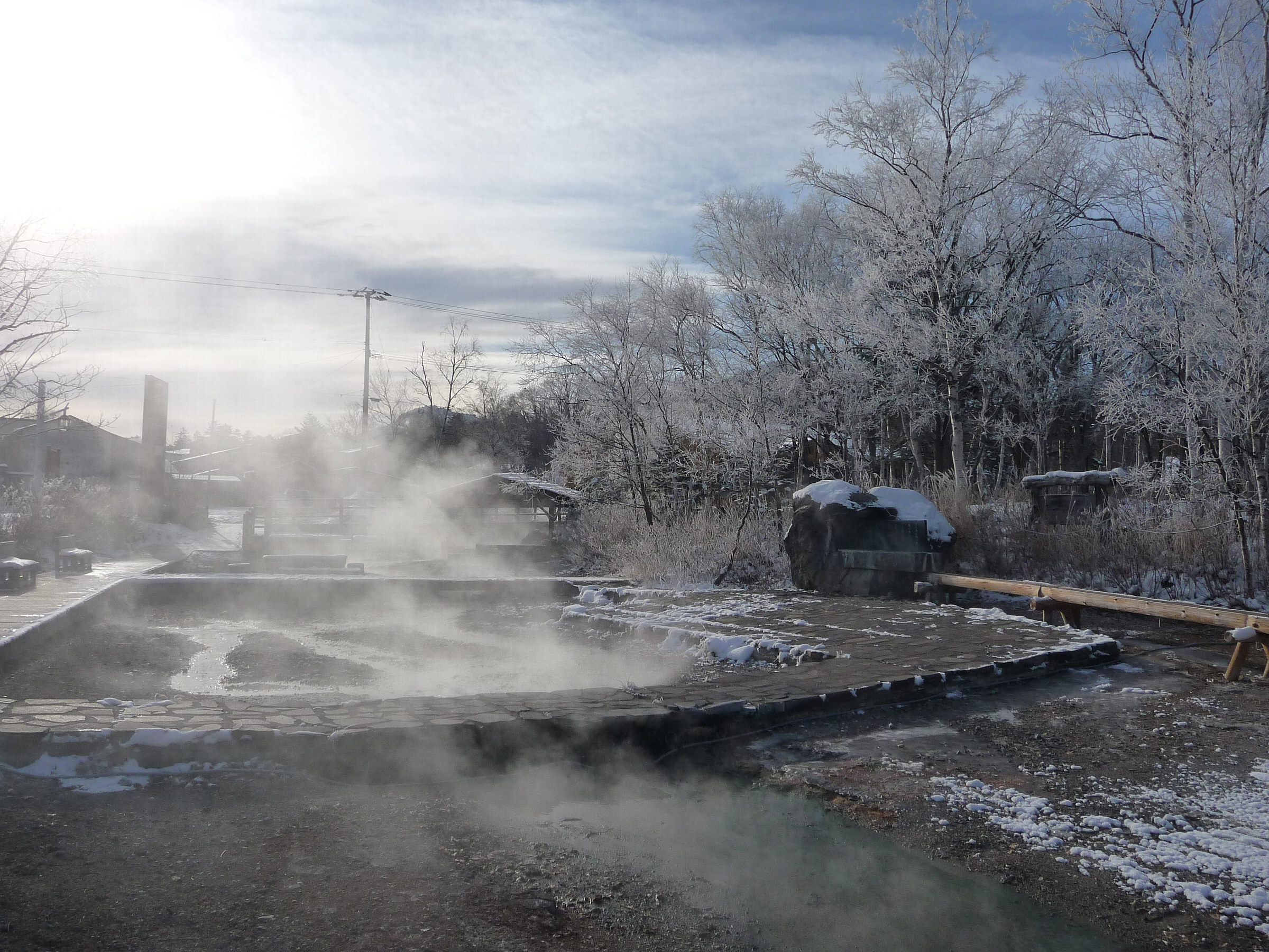 北海道弟子屈町川湯温泉を流れている湯川と、側にある足湯。